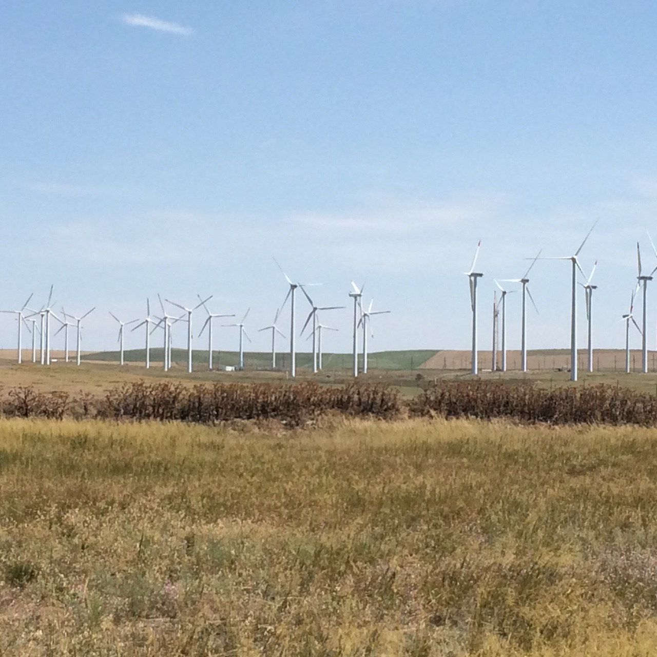 Кордайская ВЭС у посёлка Музбель, Казахстан